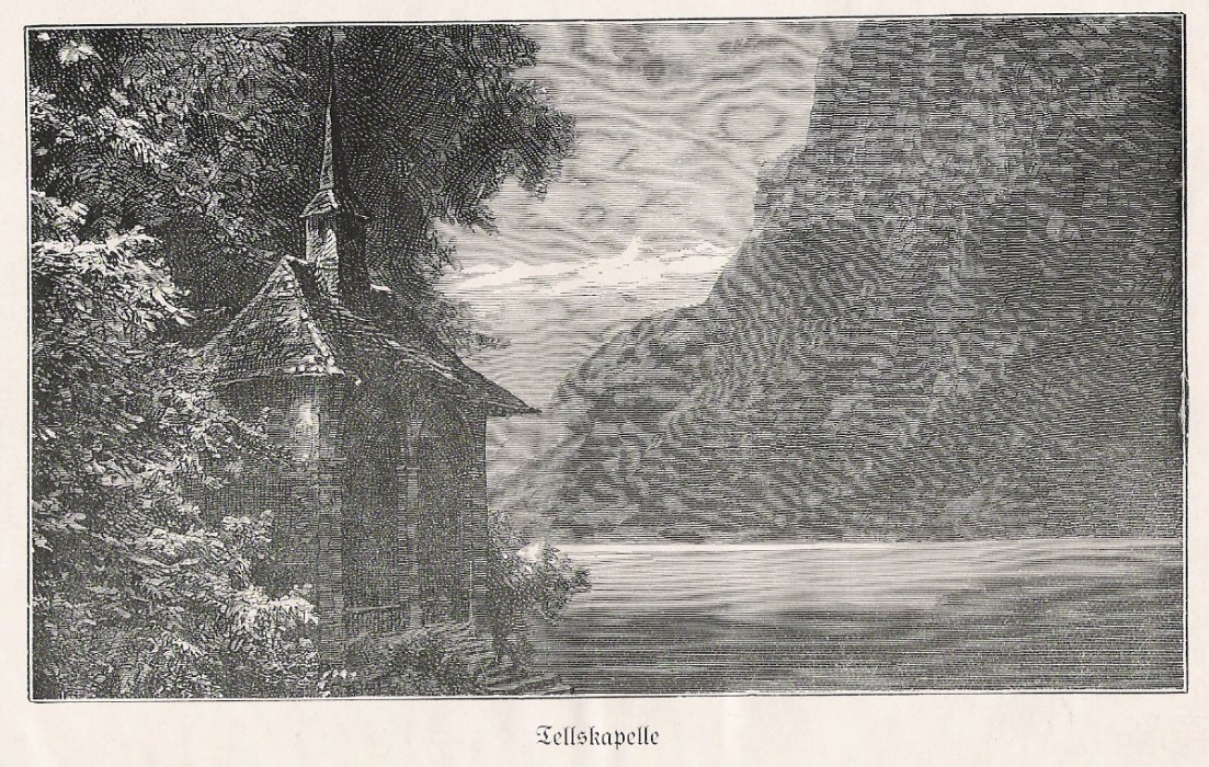 Tellskapelle, aus "Wilhelm Tell", Paderborn 1914, Verlag Ferdinand Schöningh, Gescannt 2004 Dominik Hundhammer